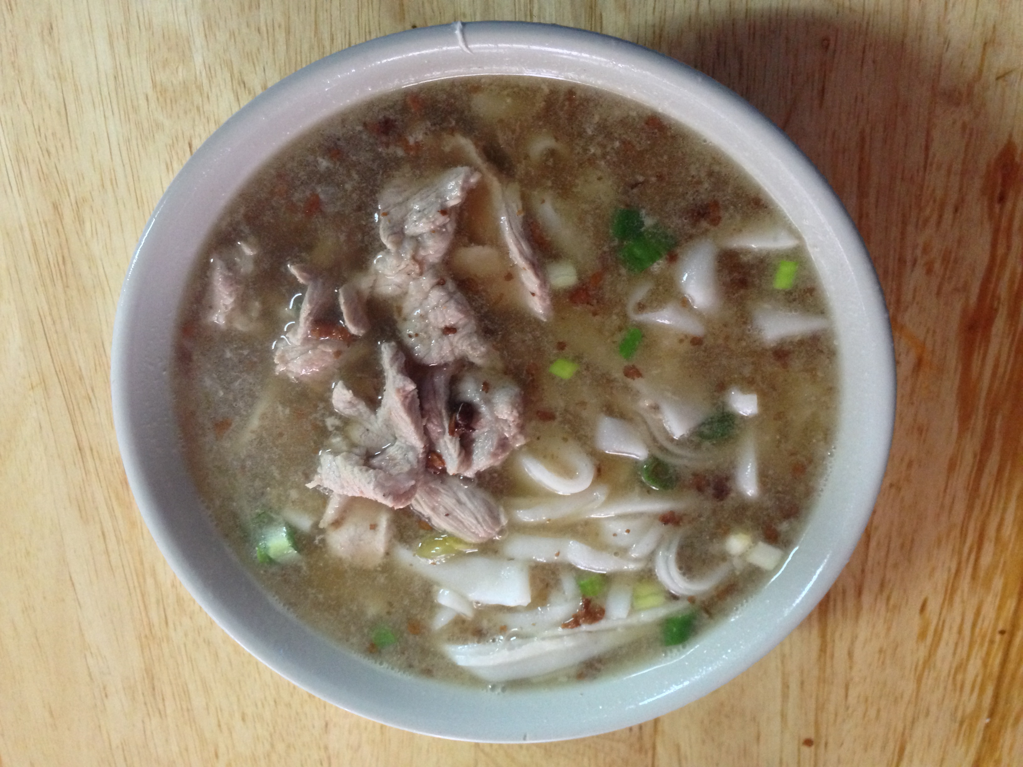 中文（台灣）: 國旗屋雲南米干